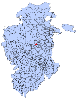 Fresno de Rodilla en Burgos